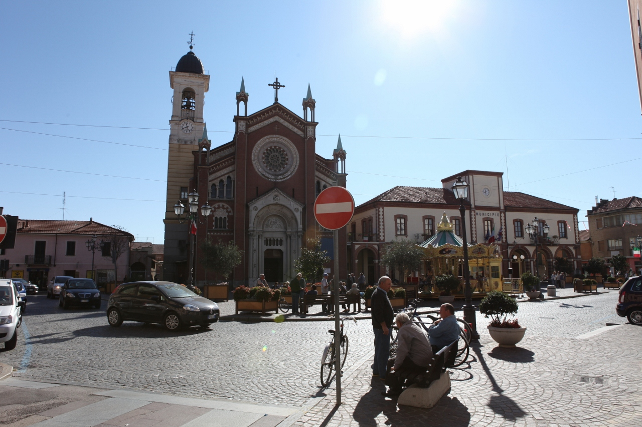 Orbassano 10/2011